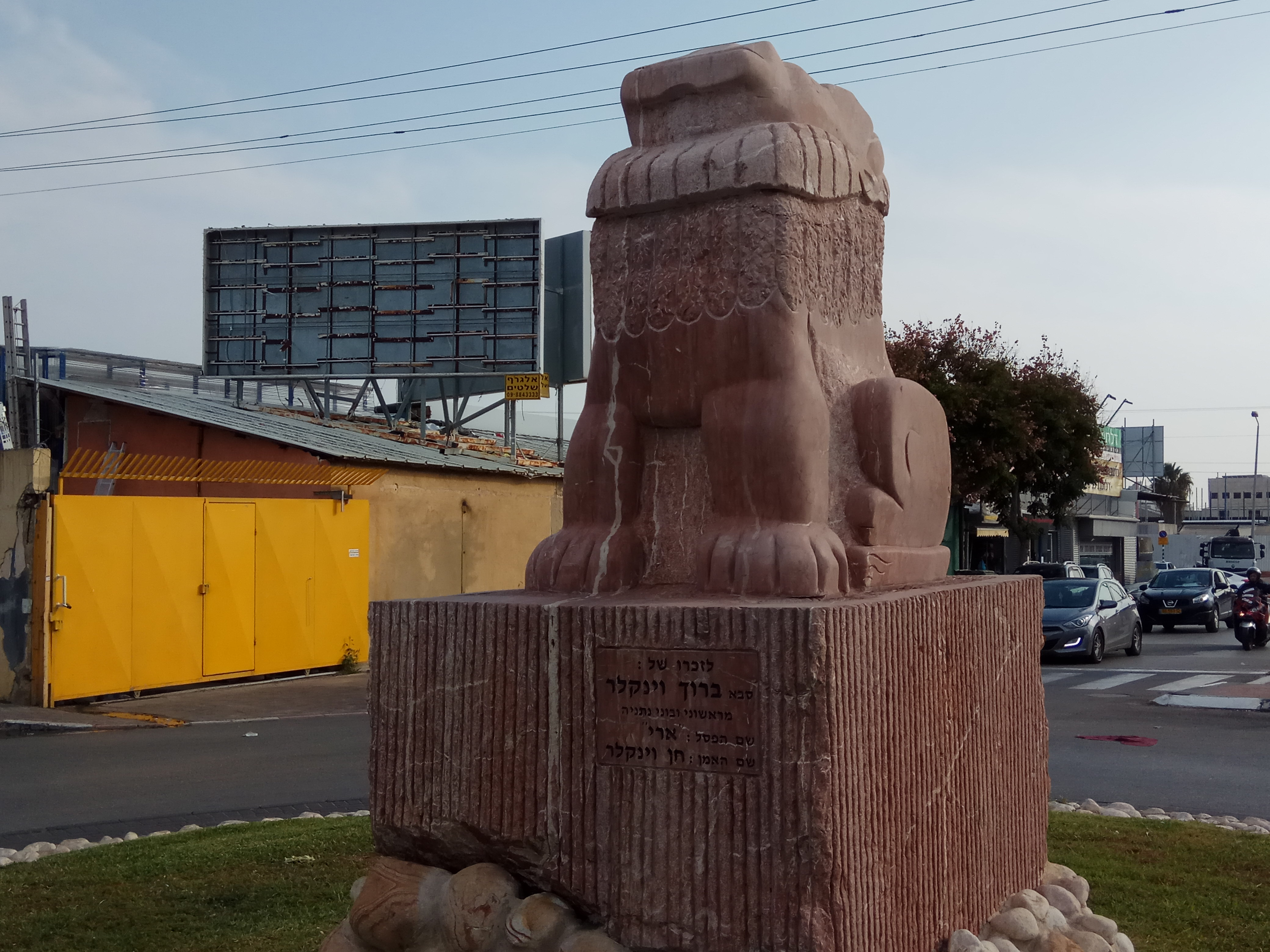 הפסל "ארי" של חן וינקלר בכיכר ברוך וינקלר בנתניה